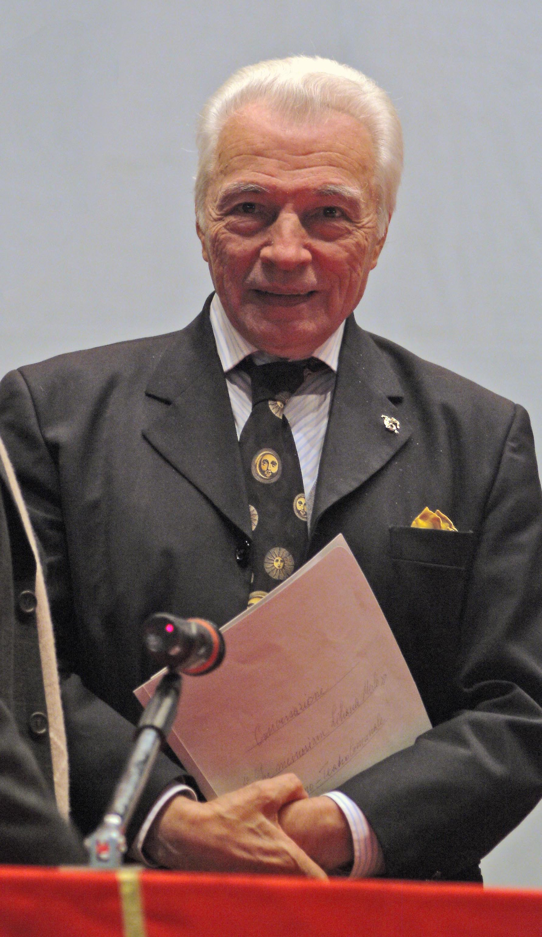 Alberto Testa al termine del Convegno Nazionale su Liliana Merlo (Teramo, 17 ottobre 2003) - particolare Fonte file: opera propria Data: 2009 Autore: Archivio Liliana Merlo Licenza: pubblico dominio